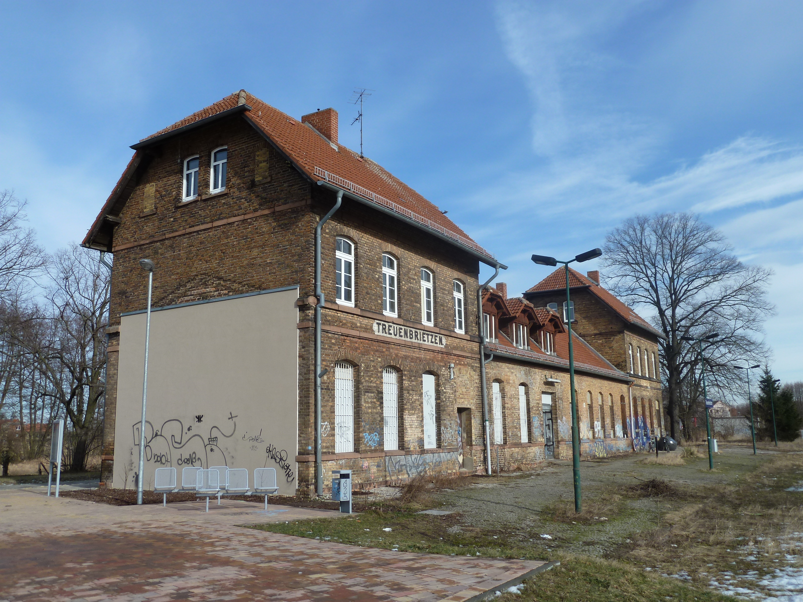 Bahnhof Treuenbrietzen, denkmalgeschütztes Empfangsgebäude